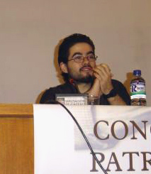 Estremeñu: Ismael nel congressu APLEX 2004.